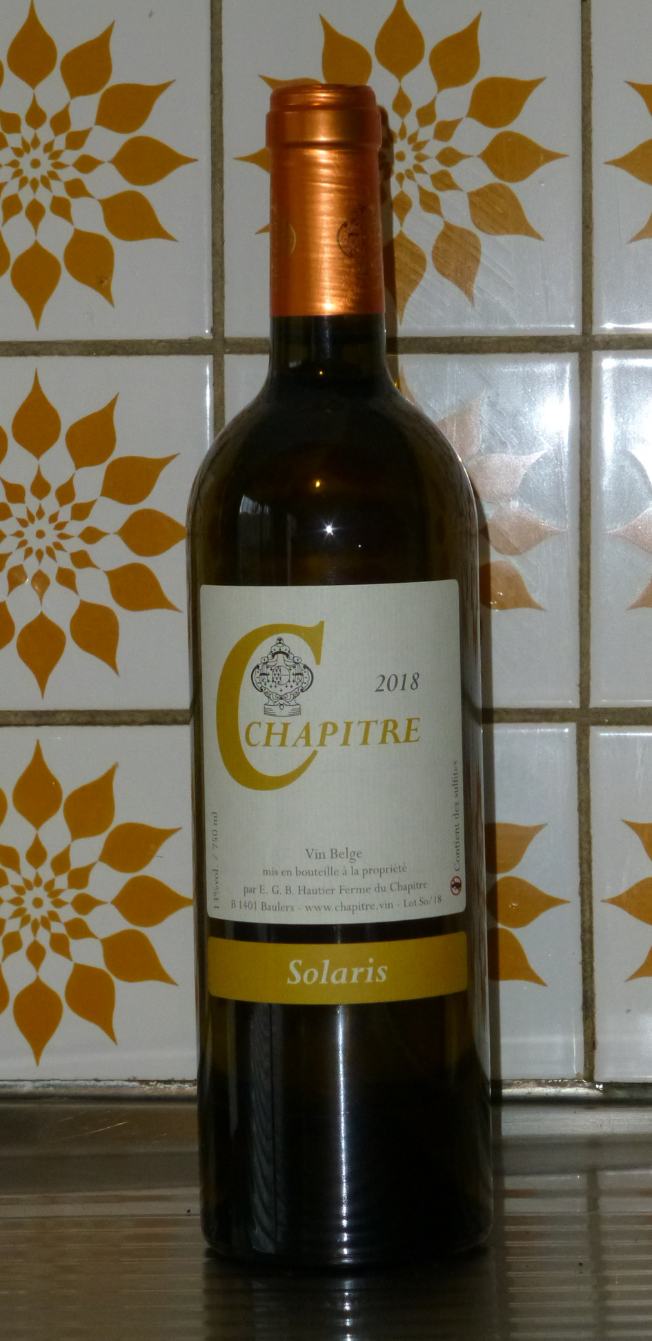 Chapitre, Vin Belge Baulers 2018, cépage Solaris